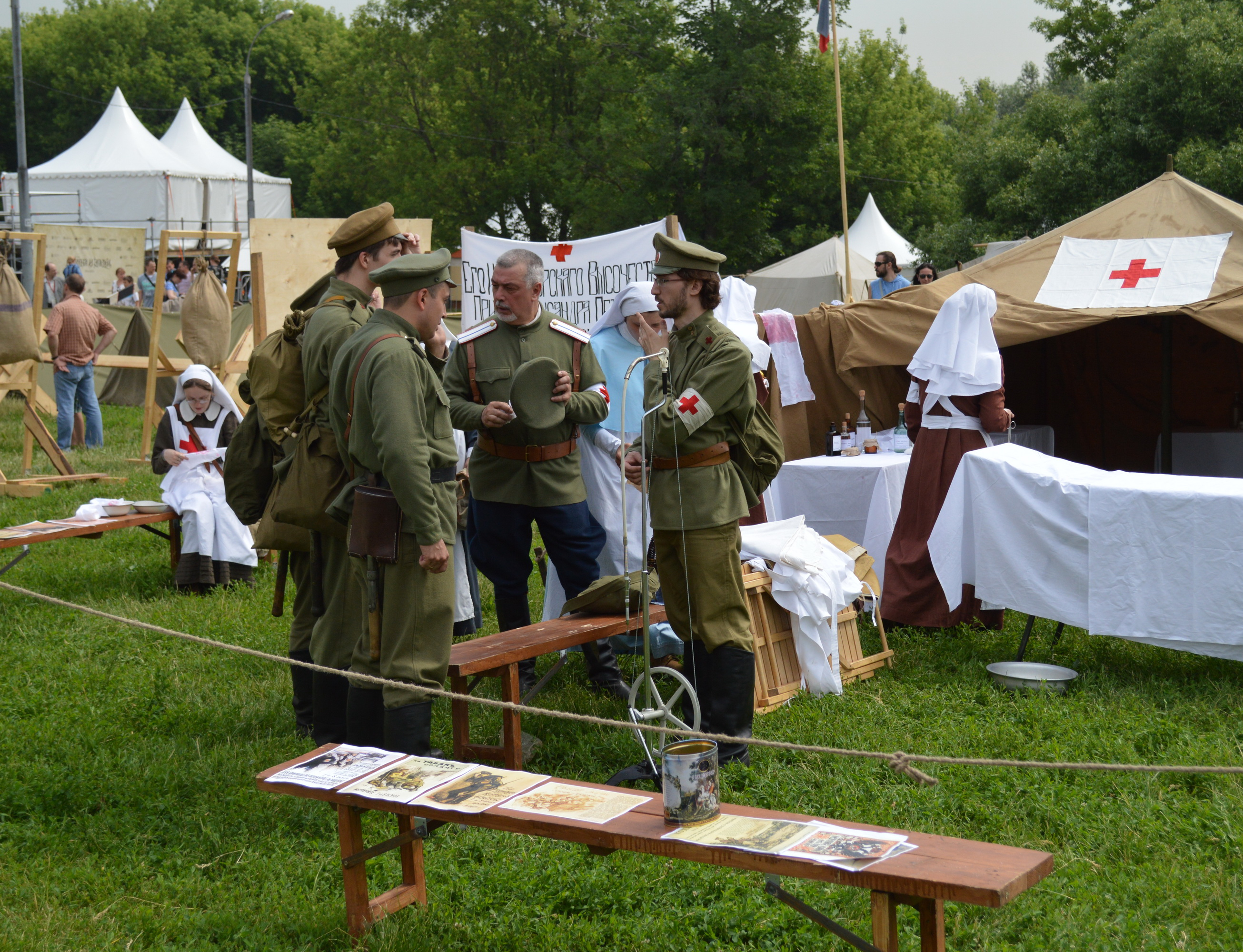 Фестиваль исторической реконструкции "Времена и эпохи" в Коломенском.